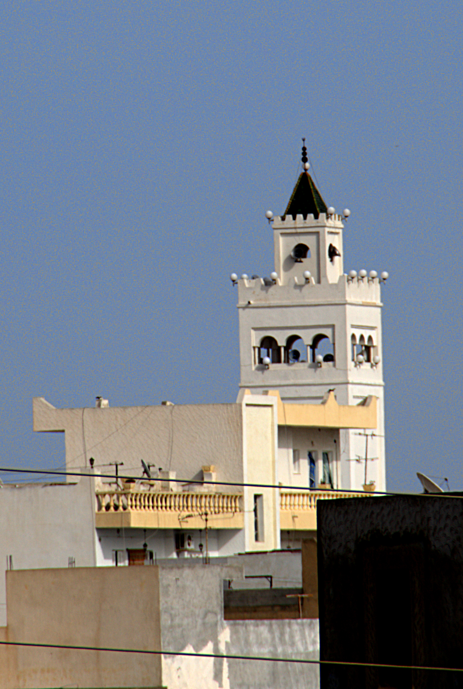 Minaret de la grande mosquée de Akouda, Tunisie